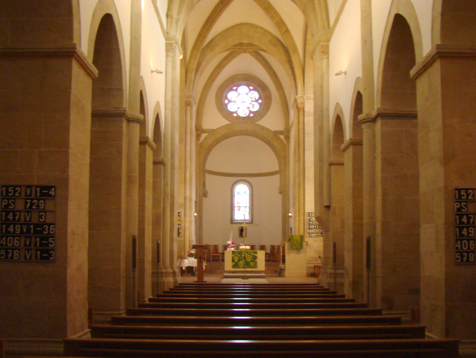 Boxberg-Wölchingen, Frankendom